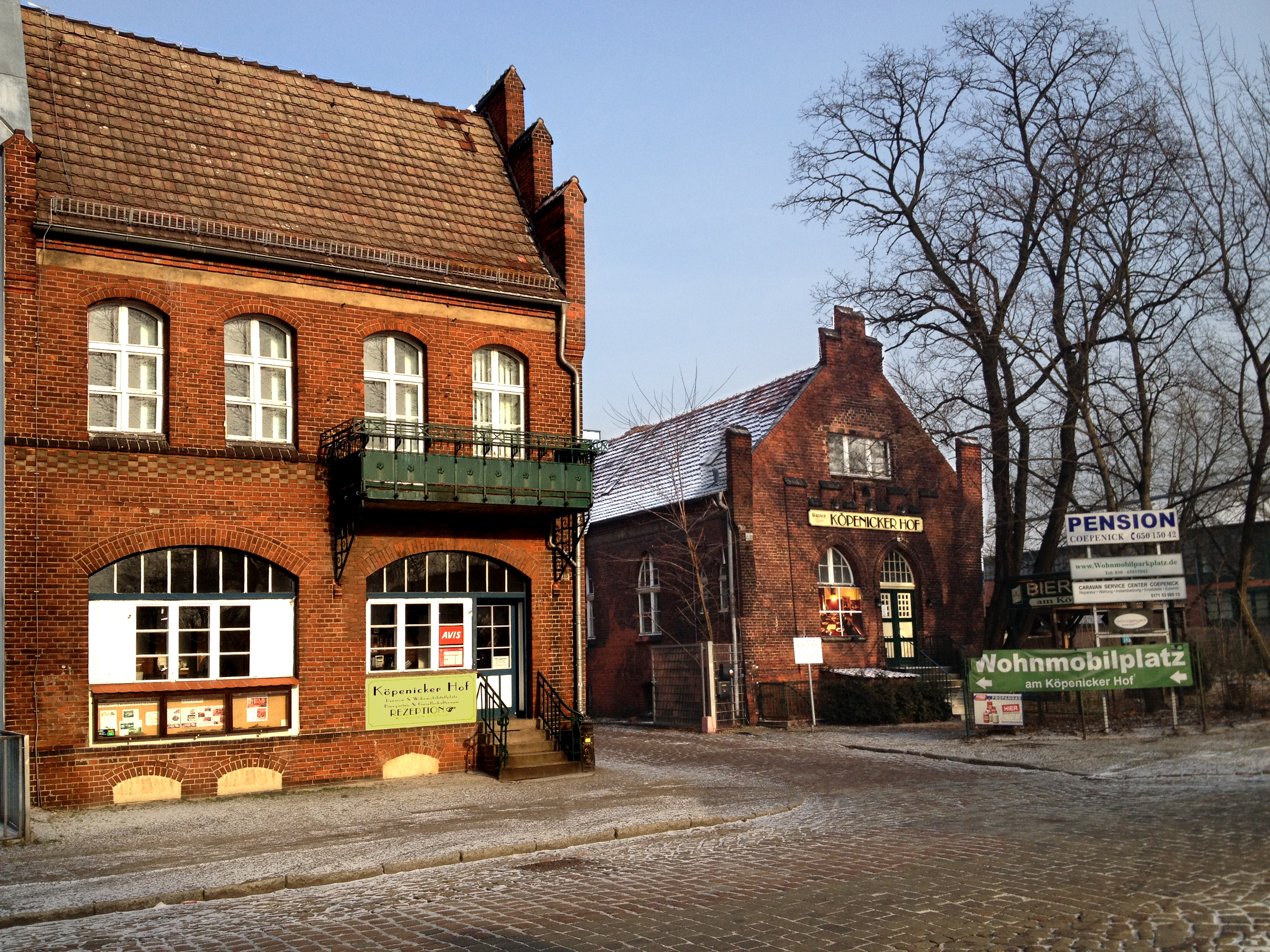 Straßenansicht des Köpenicker Hofes, 2012